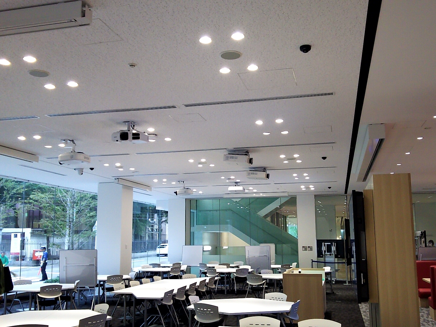 東北学院大学ラーニングコモンズ「コラトリエ」